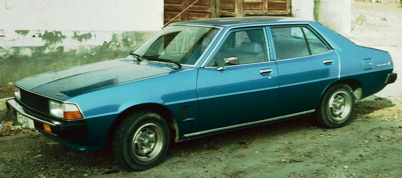 Mitsubishi Galant (Galant Sigma) 1976 - 1980 Tenerife